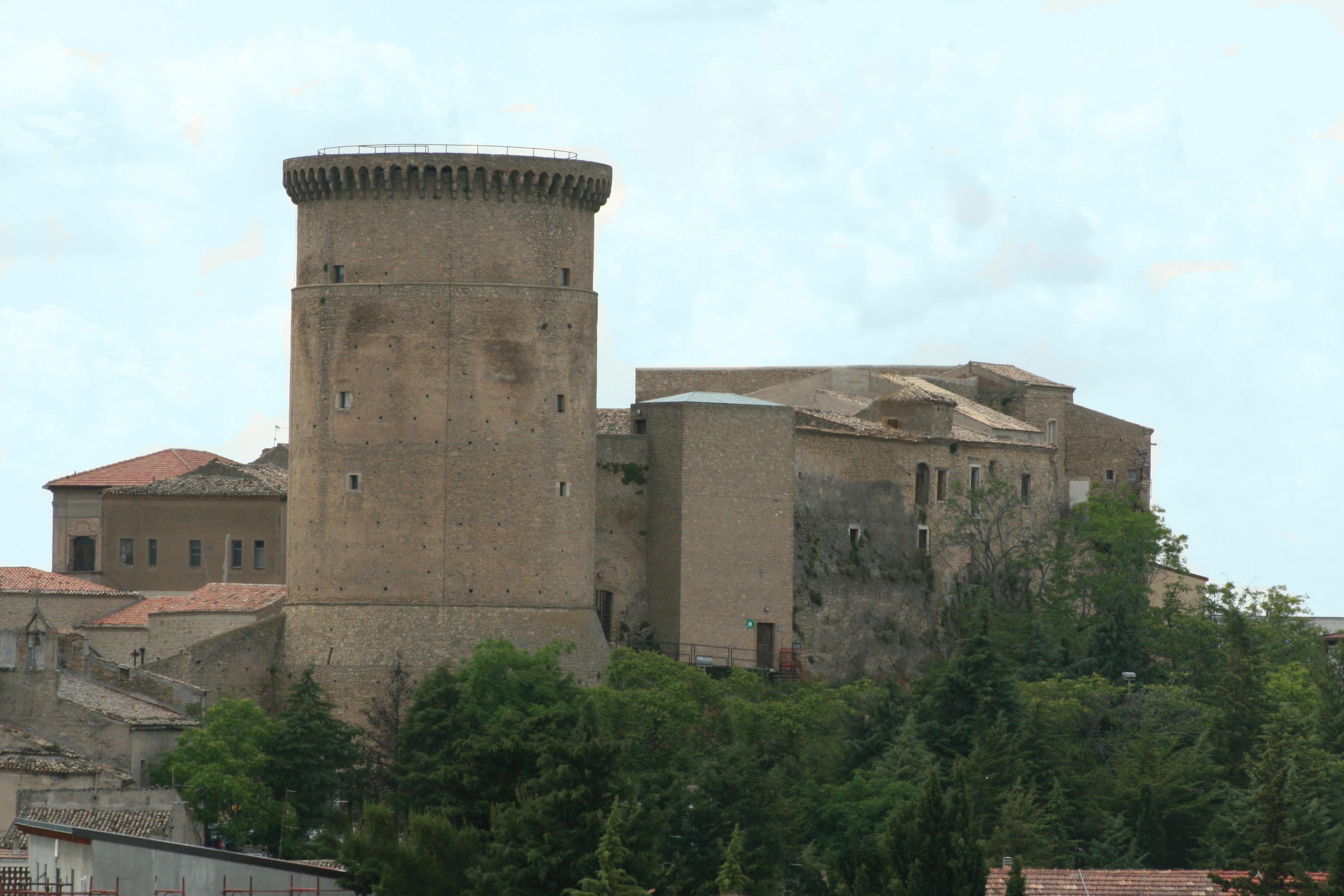 Autore: Rocco Stasi, fatta da me. La torre normanna ed il complesso di S. Chiara (ex castello normanno) dal rione S. Nicola. GFDL, sono l'autore